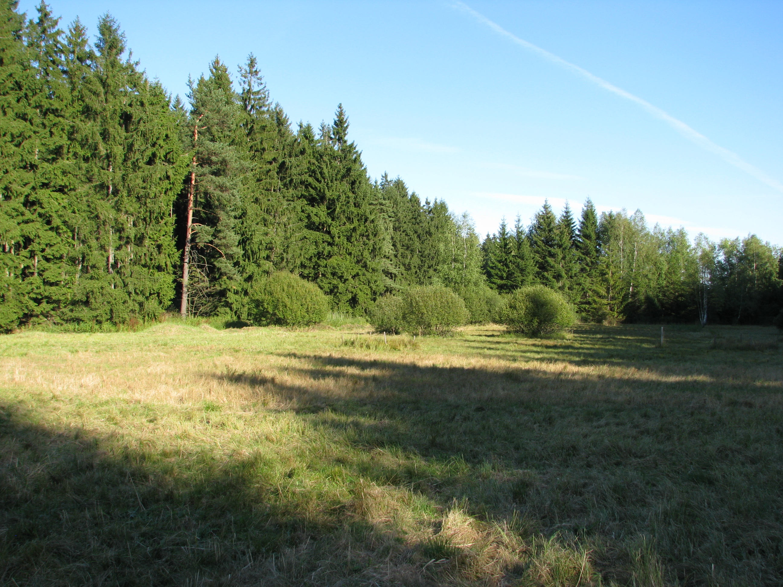 Šafranice, Vysočina